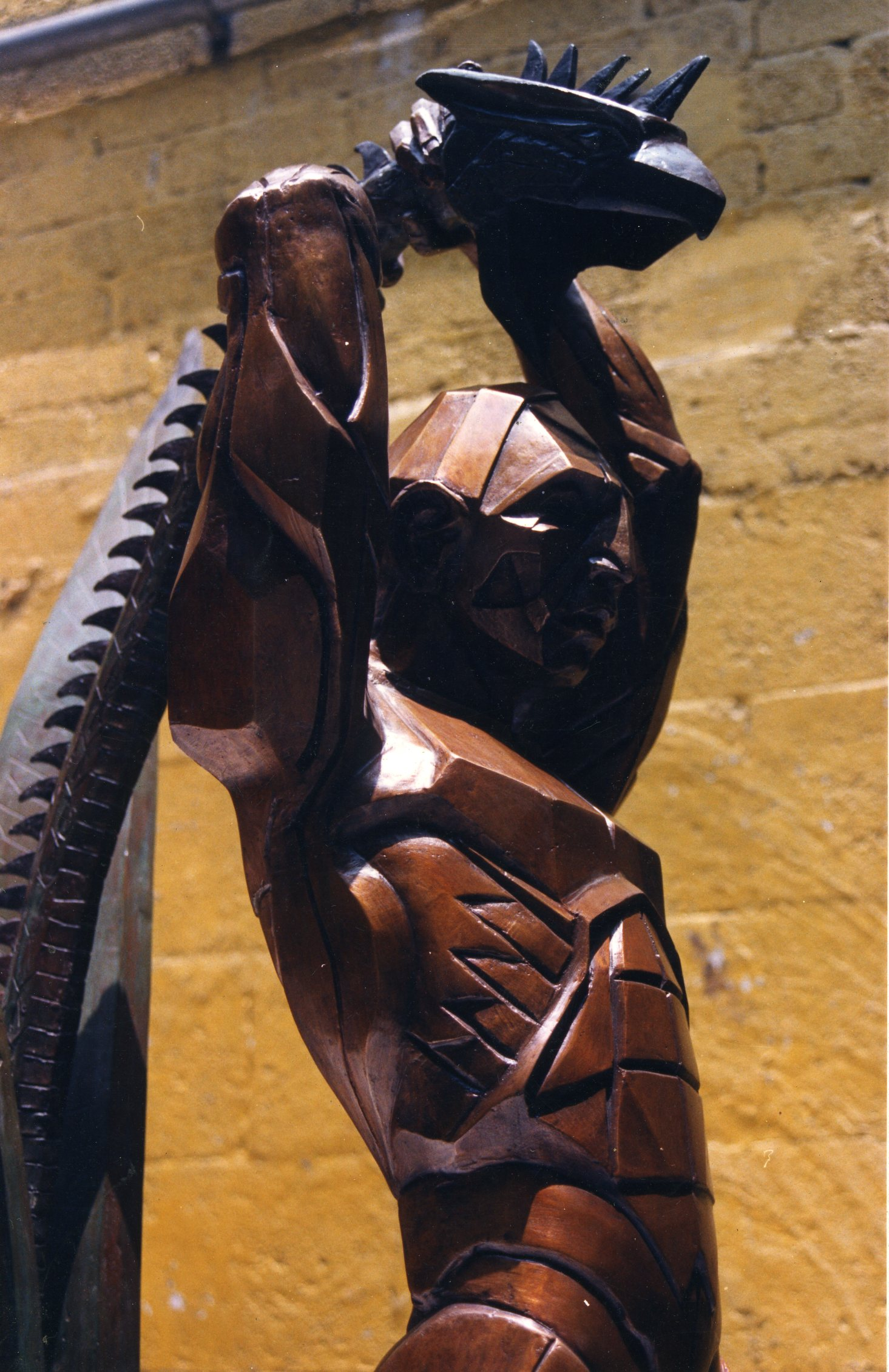 Hombre Cosmico dominio del elemento